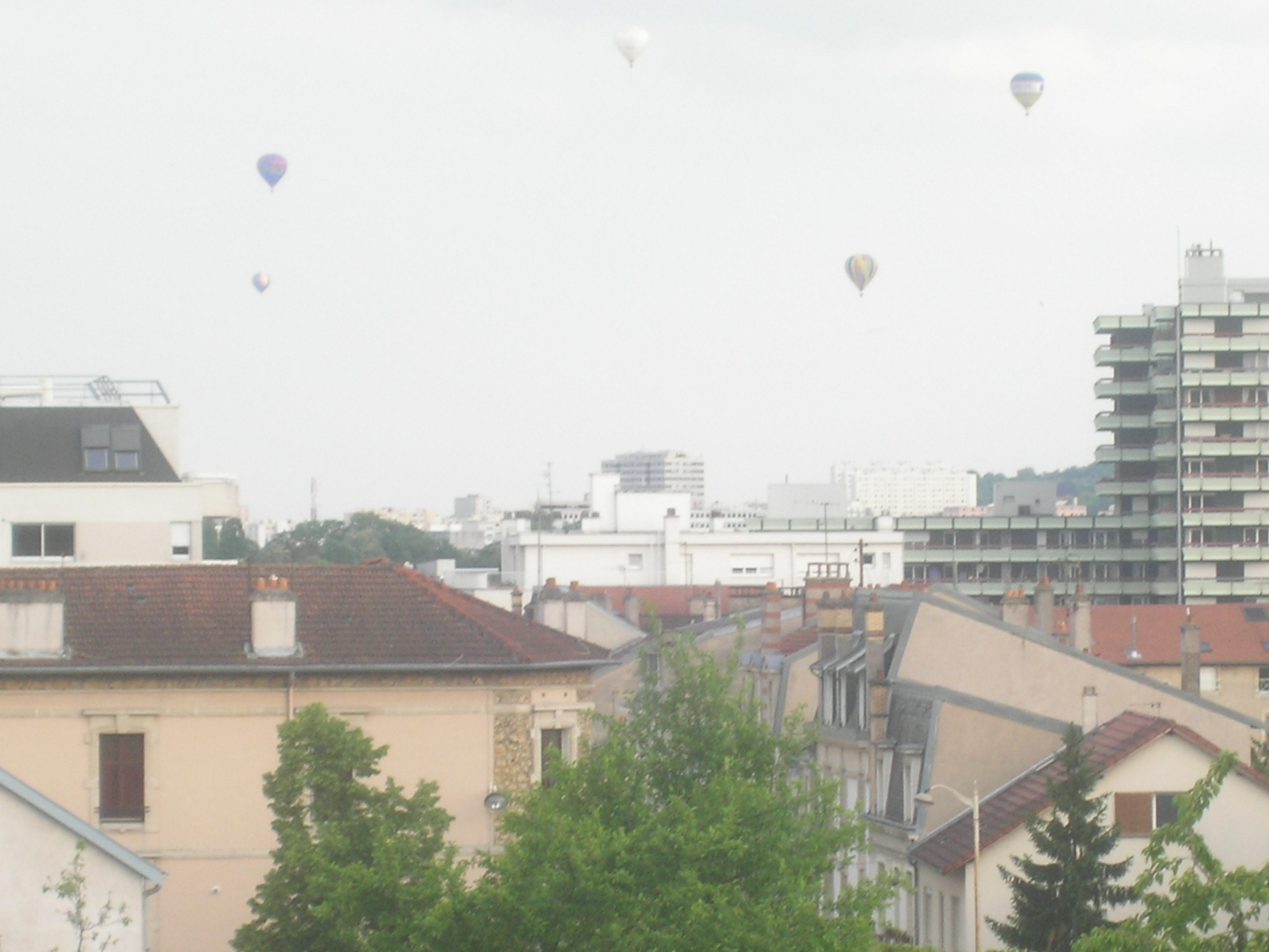 Vol de mongolfières au-dessus de Nancy, en mai 2011. A l'extrême droite, on aperçoit une partie de la tour de la résidence du Clos de Médreville réalisée par Henri Prouvé dans les années 1960.